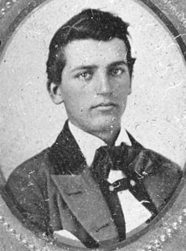 Andrew Ryan McGill.